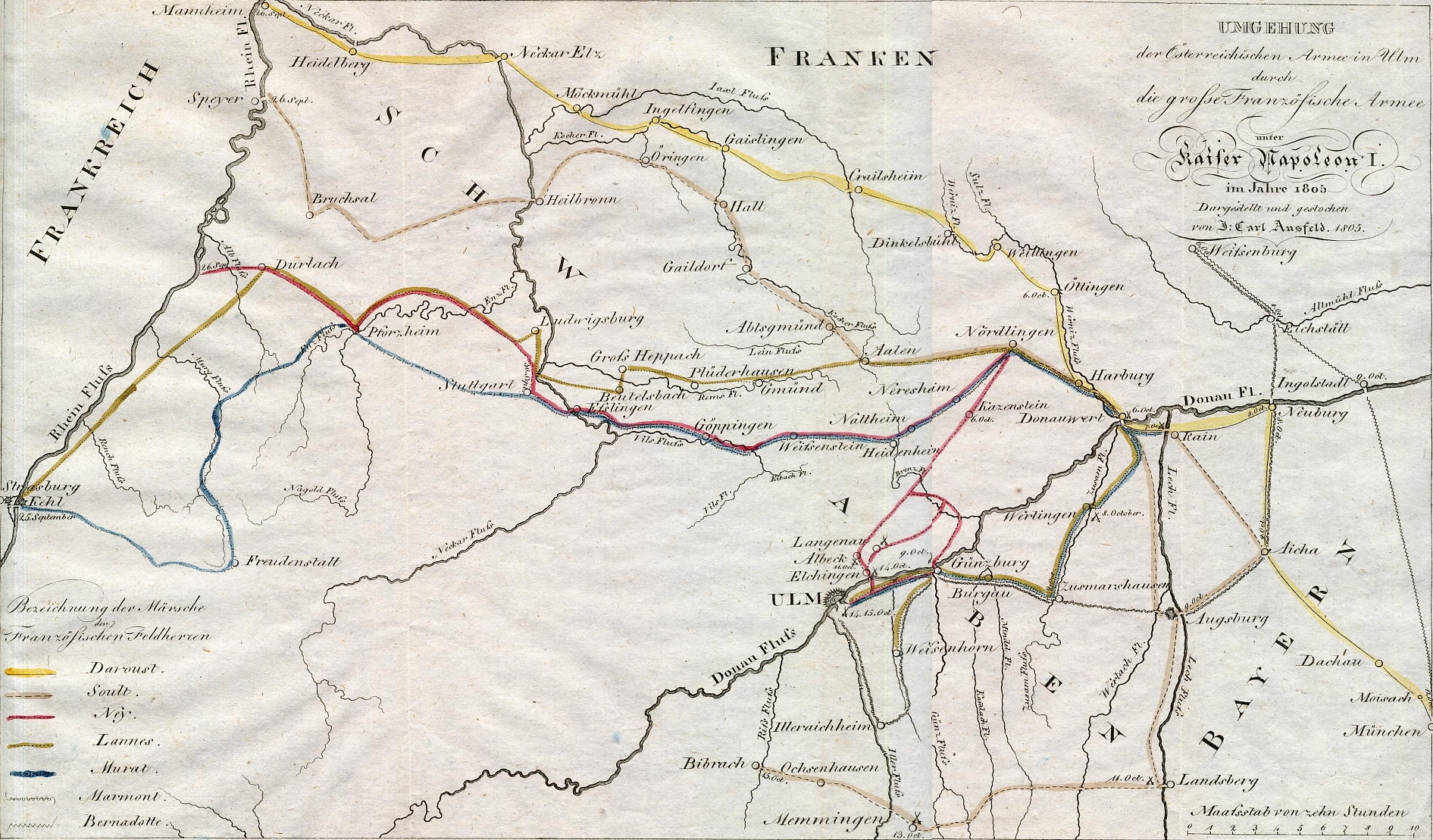 Süddeutschland Rheinübergänge Französische Armeekorpsen Ulm Österreichische Armee Marschlinien